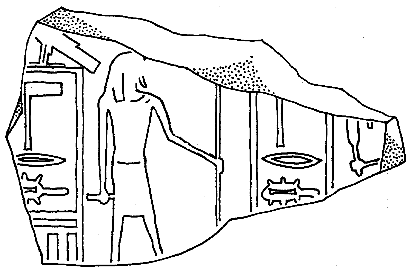 Tonsiegel des Djoser